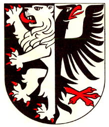 Wappen von - Flag of Maerstetten